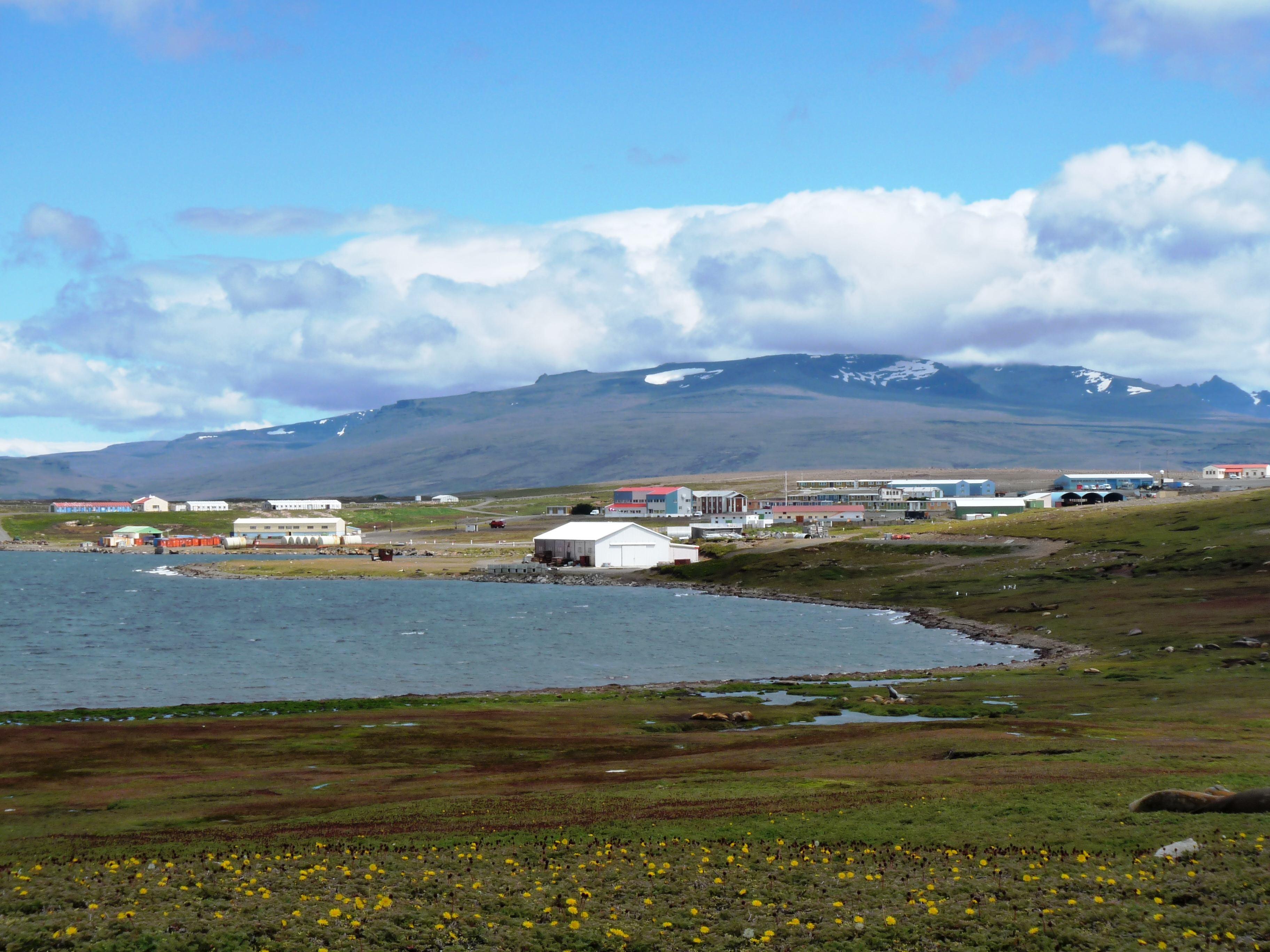 Portofransē polārstacija